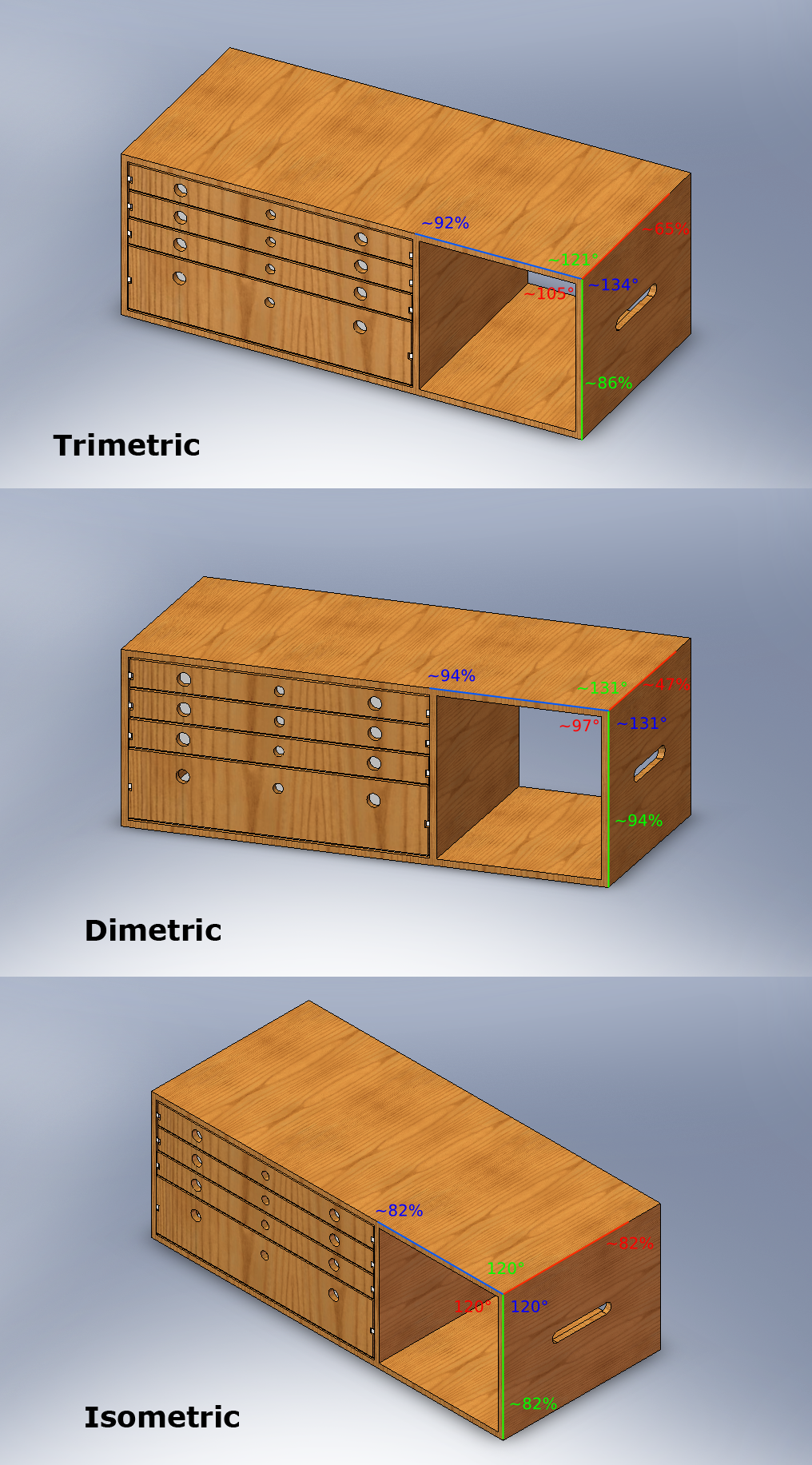 Axonometric projections